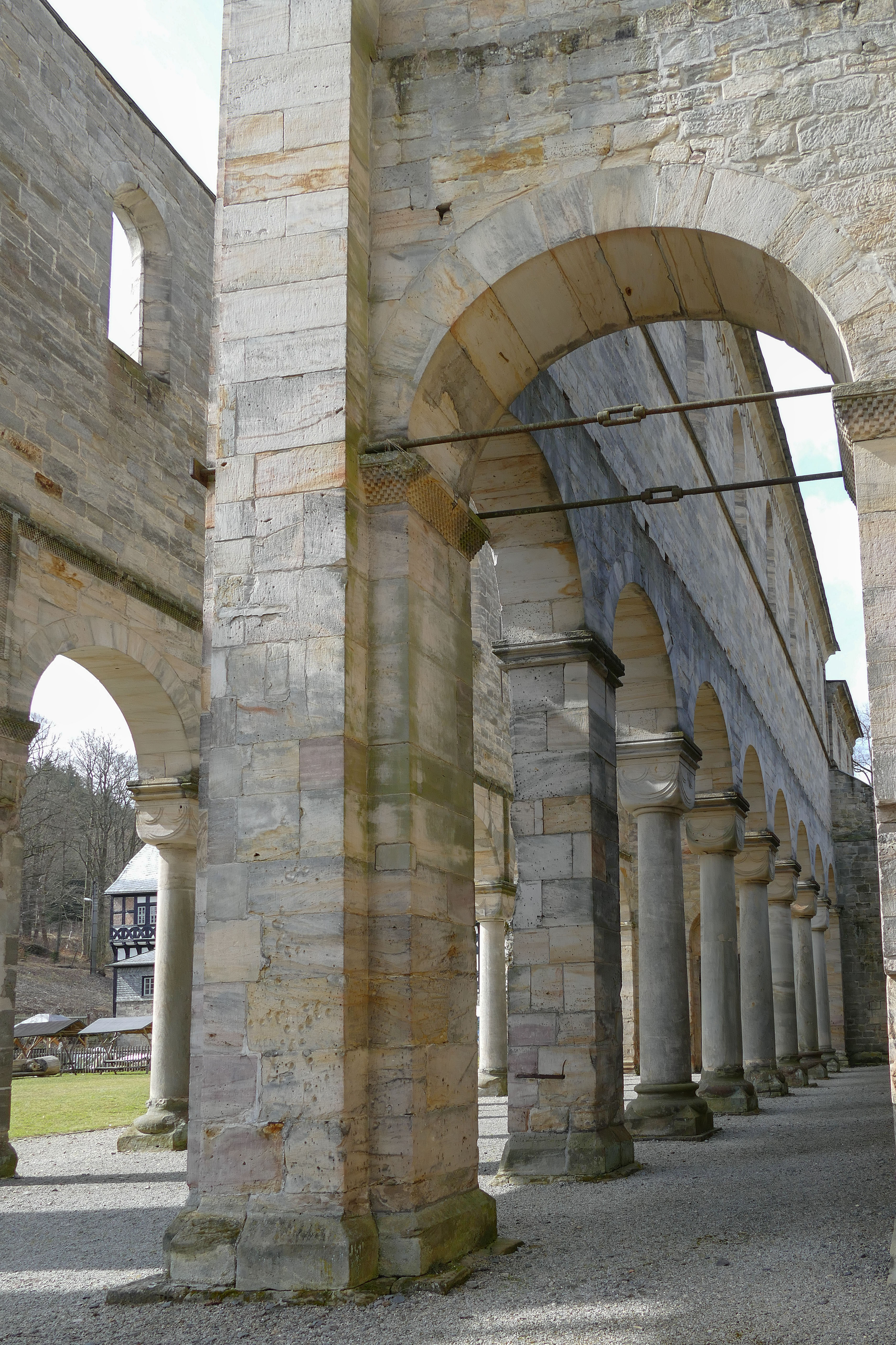 Blick von Osten ins Kirchenschiff